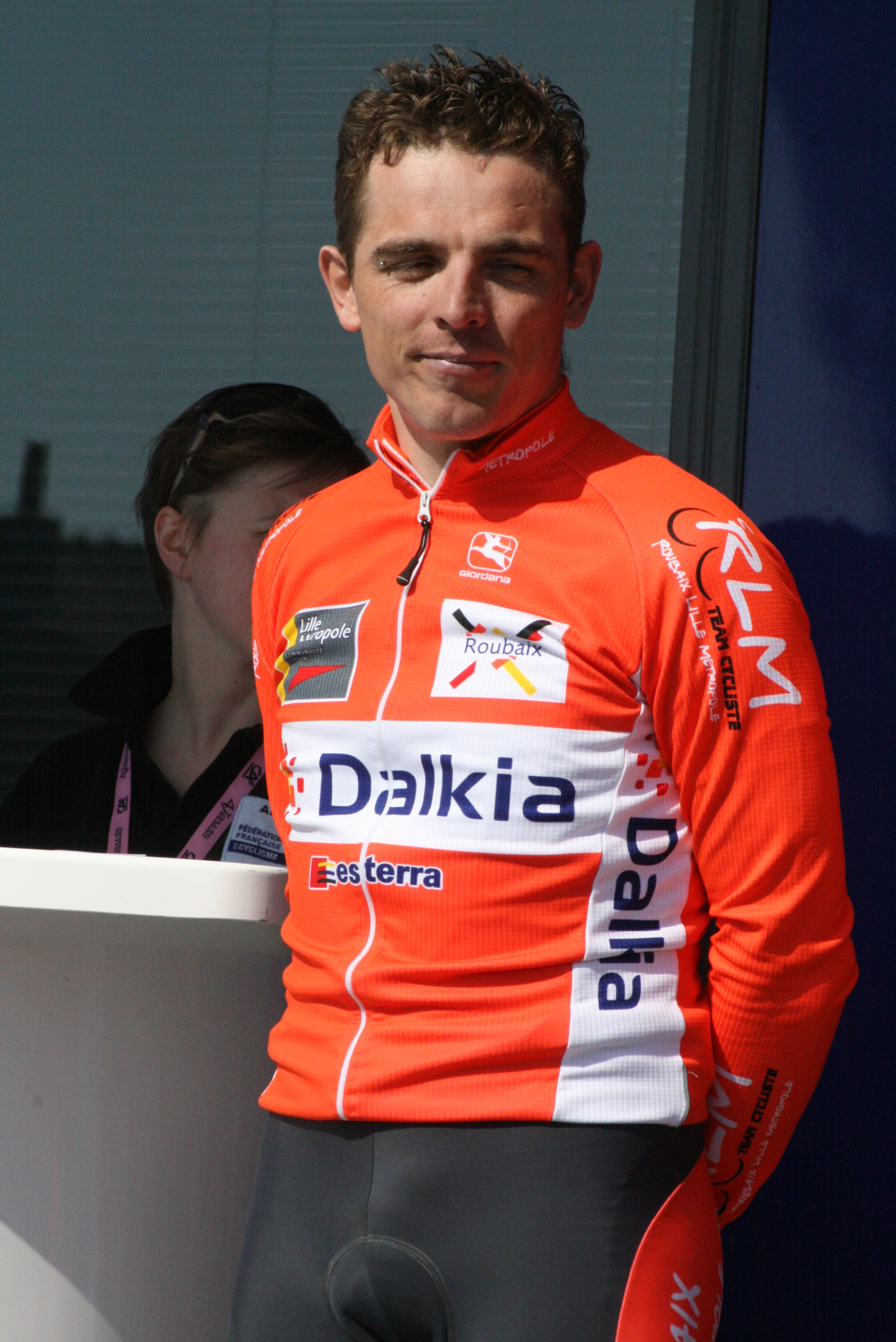 Présentation des coureurs au départ de la première étape Denis Flahaut